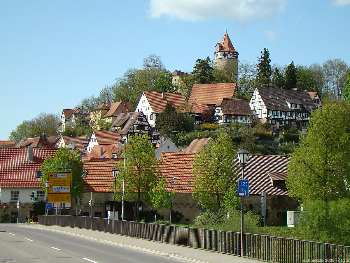 Blick zum Burgberg in Möckmühl